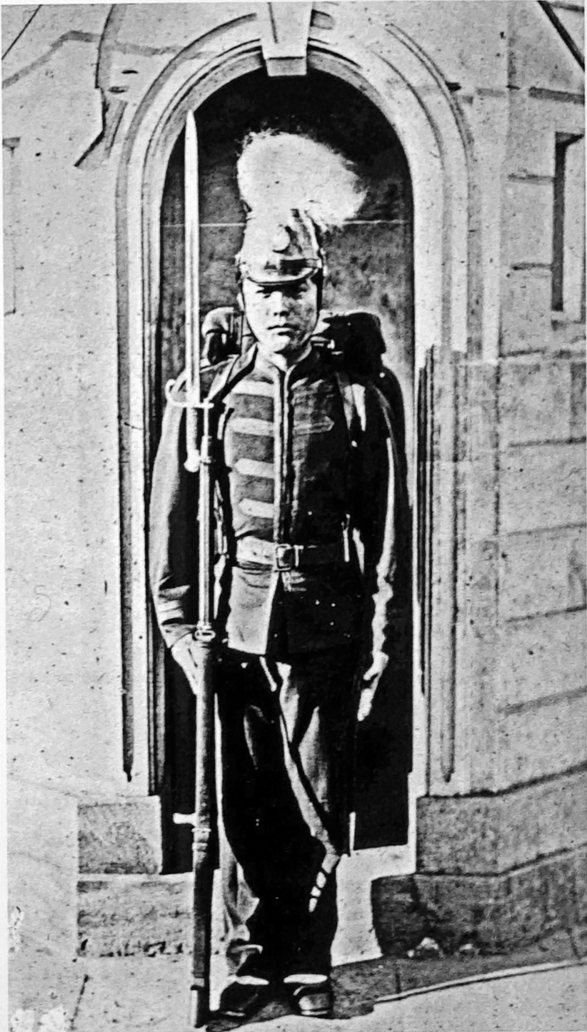 utilisé par Krafft pour conférence une de photographies prise lors de son voyage au Japon en 1883.